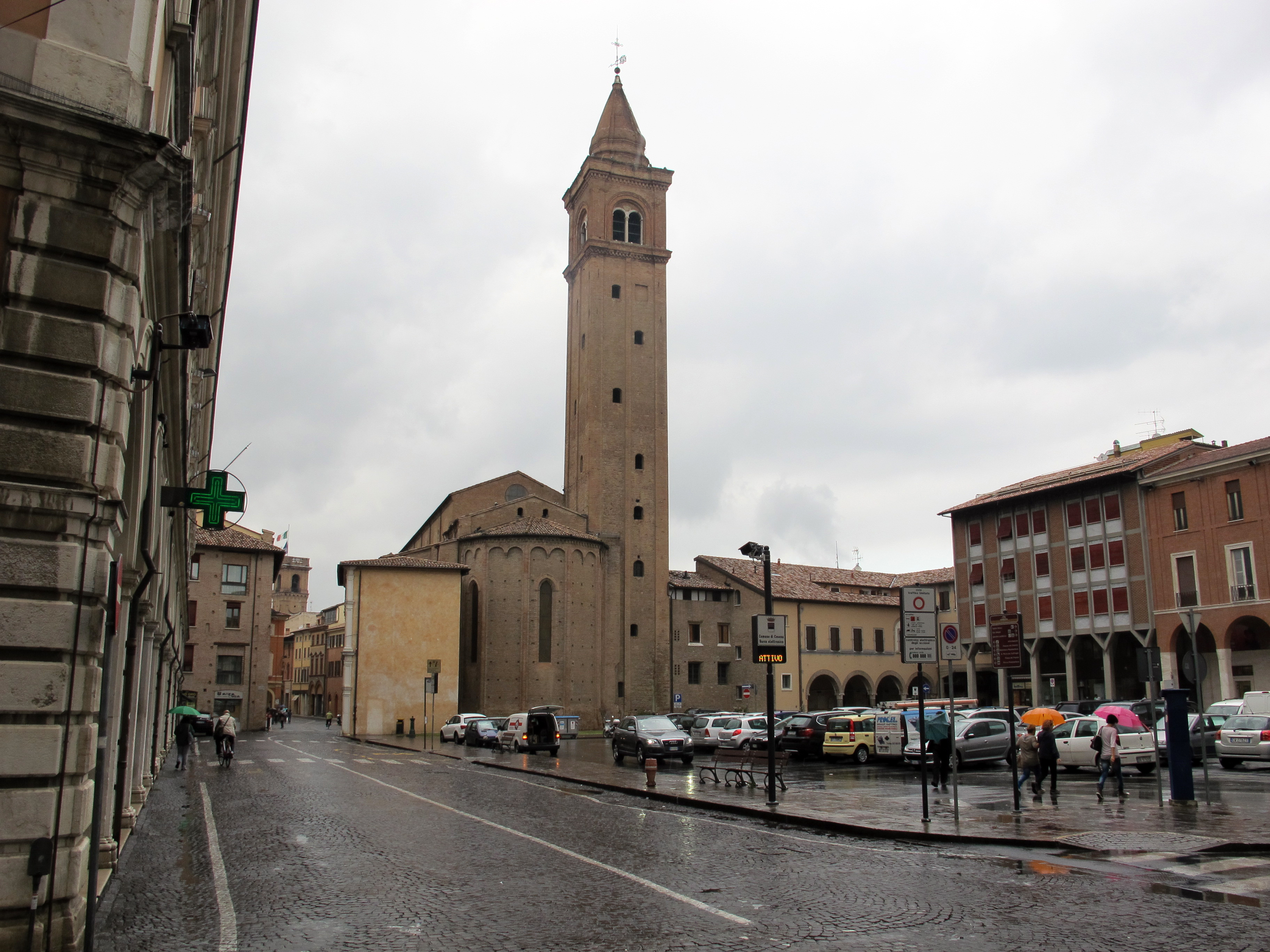 Duomo (Cesena)